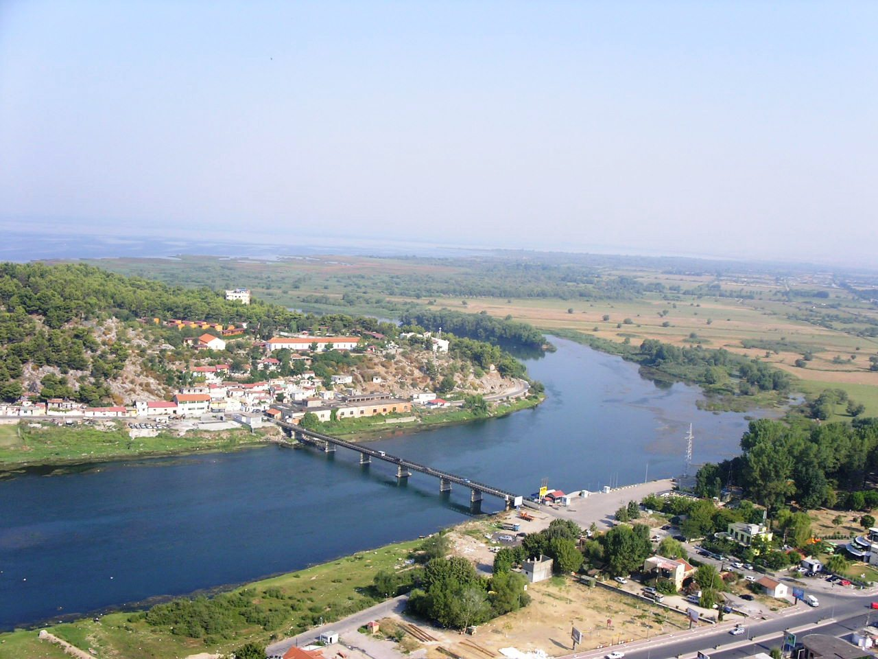 Buna në Shkoder